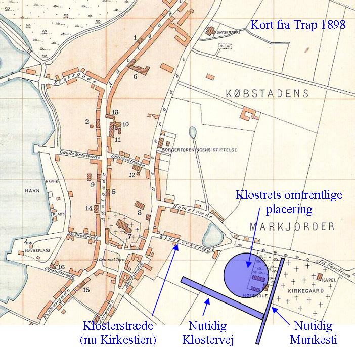 Tilføjelser til Bykort over Nysted fra Trap: Danmark 1898